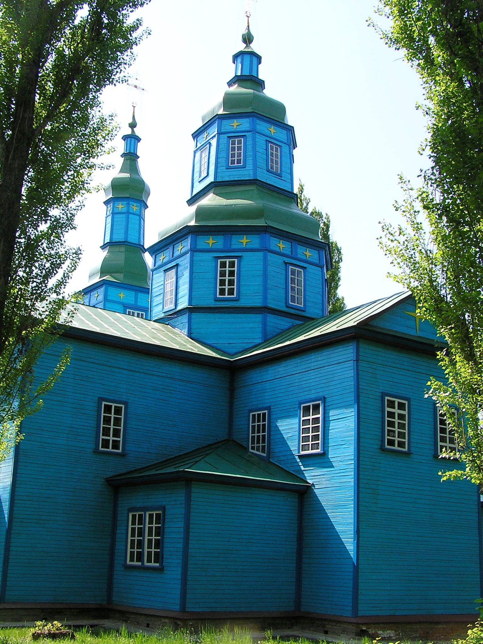 Церква, перевезена до музею з села Андруші.